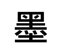 應用於墨家模板